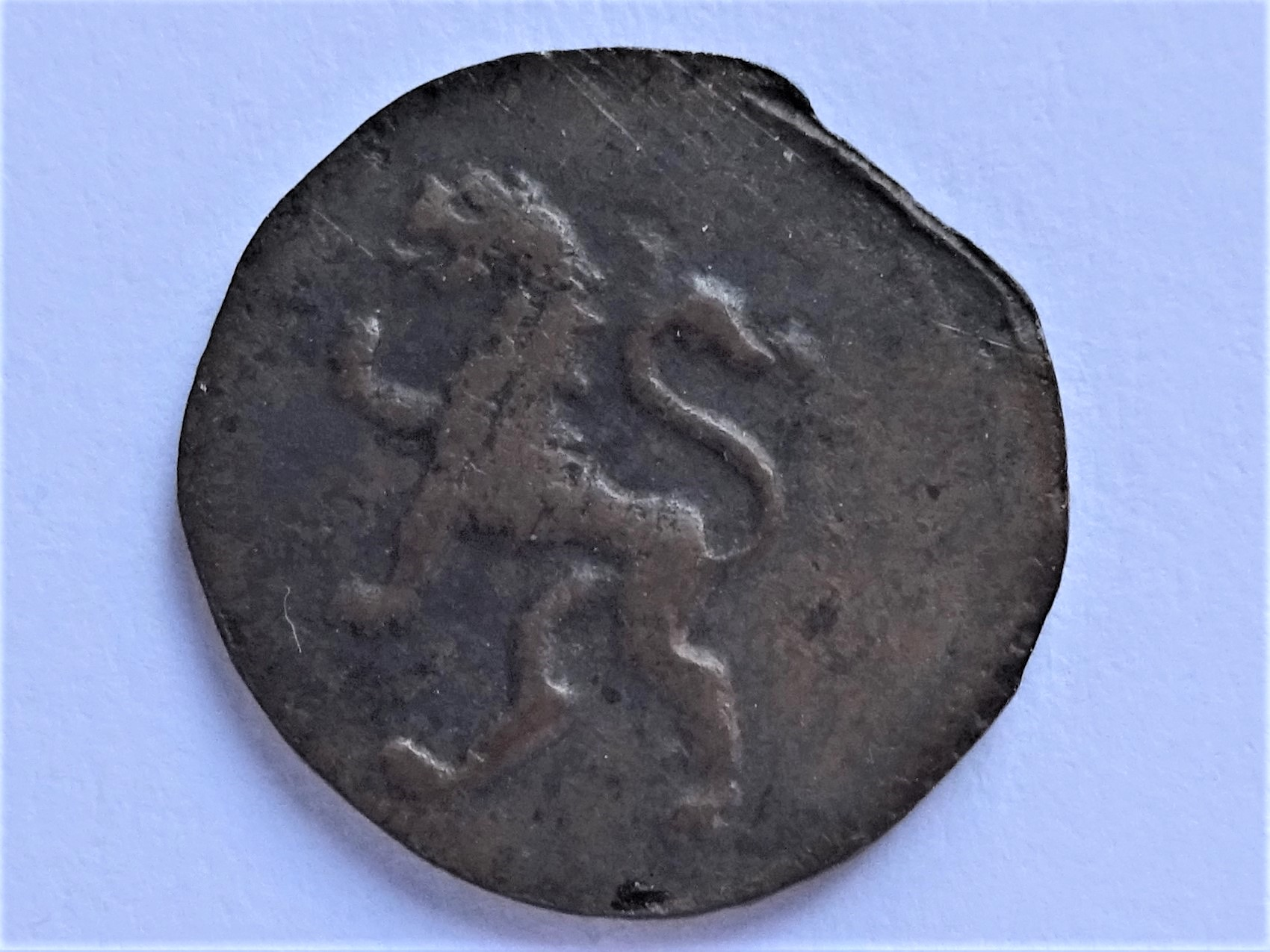 Lüneburger Scherf von 1769, Vorderseite: stehender Löwe, Gerhard Schön, Deutscher Münzkatalog Nr. 1